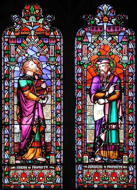 St Mildred, Tenterden, Kent - Window